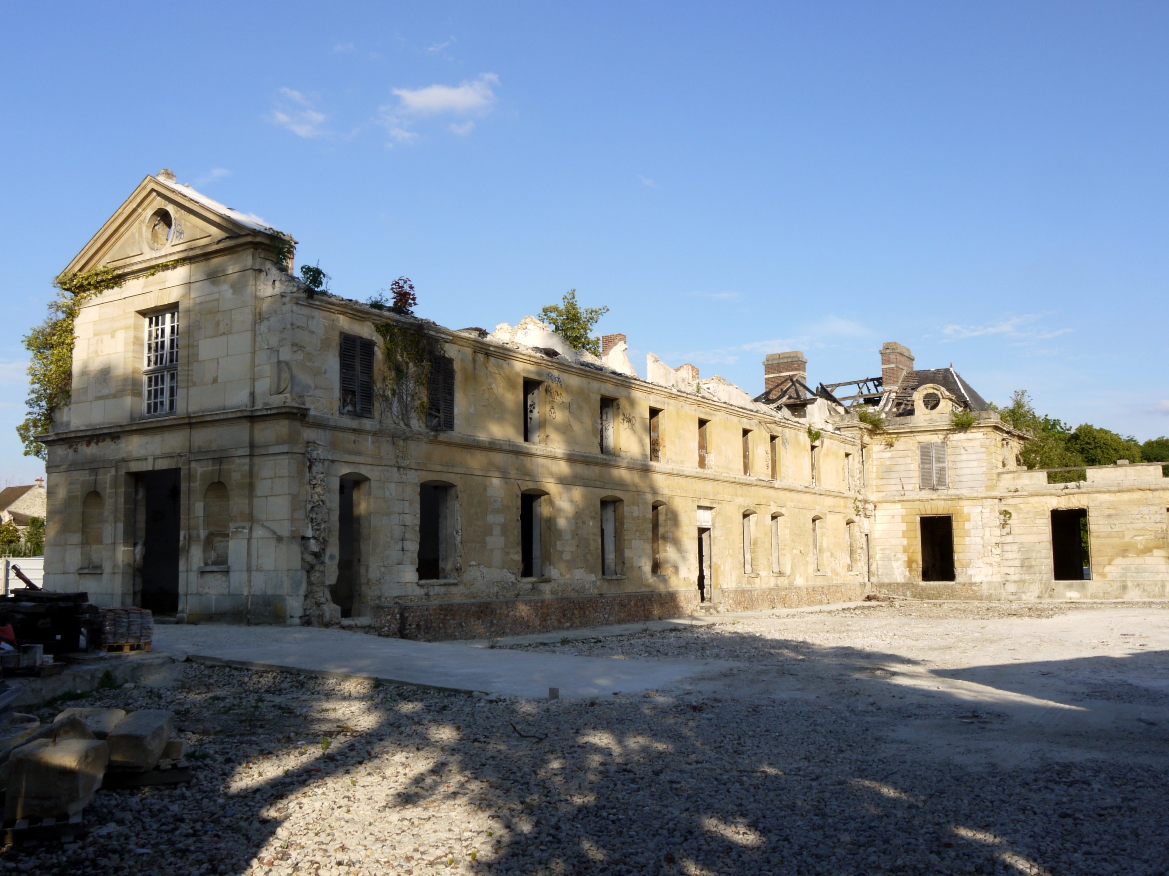 Château de Neuville sur Oise. Il ne fait pas partie des éléments concernés par la protection, qui sont le pavillon d'Amour, son soubassement et sa balustrade ; cf. la notice dans la base Mérimée.